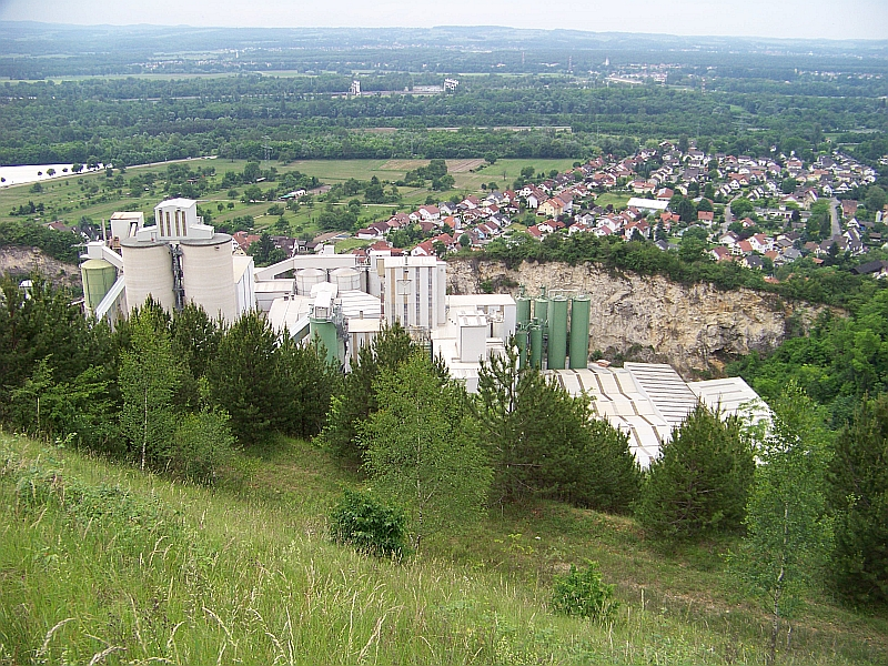 Komplettansicht des Isteiner Kalkwerks (Heidelberg Cement/Maxit)